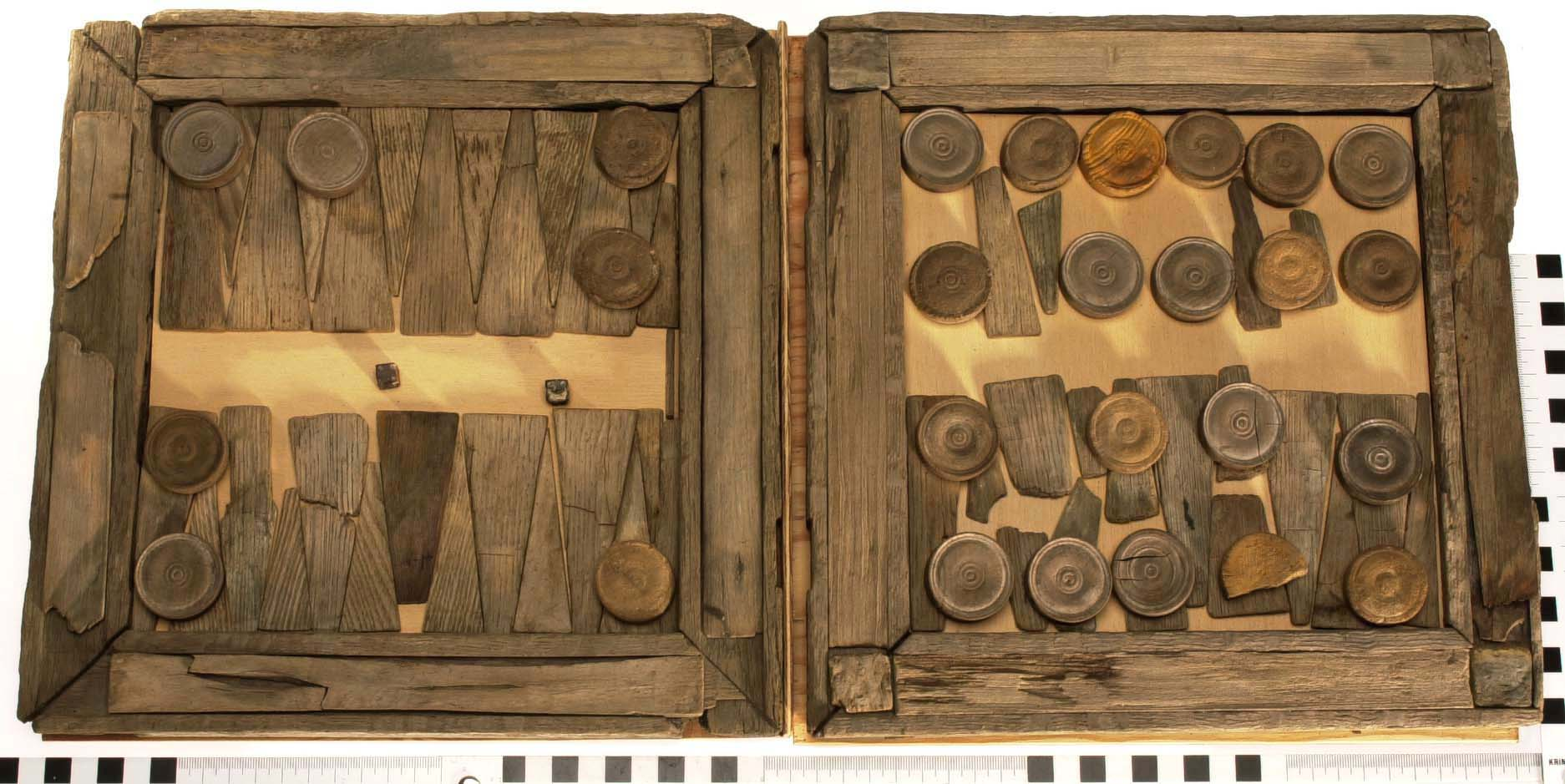 Brädspel: Brädspel. Svarvad spelbricka till brädspel. Ovansidan har koncentriska cirklar medan undersidan är slät. Skåra runtom kanten.